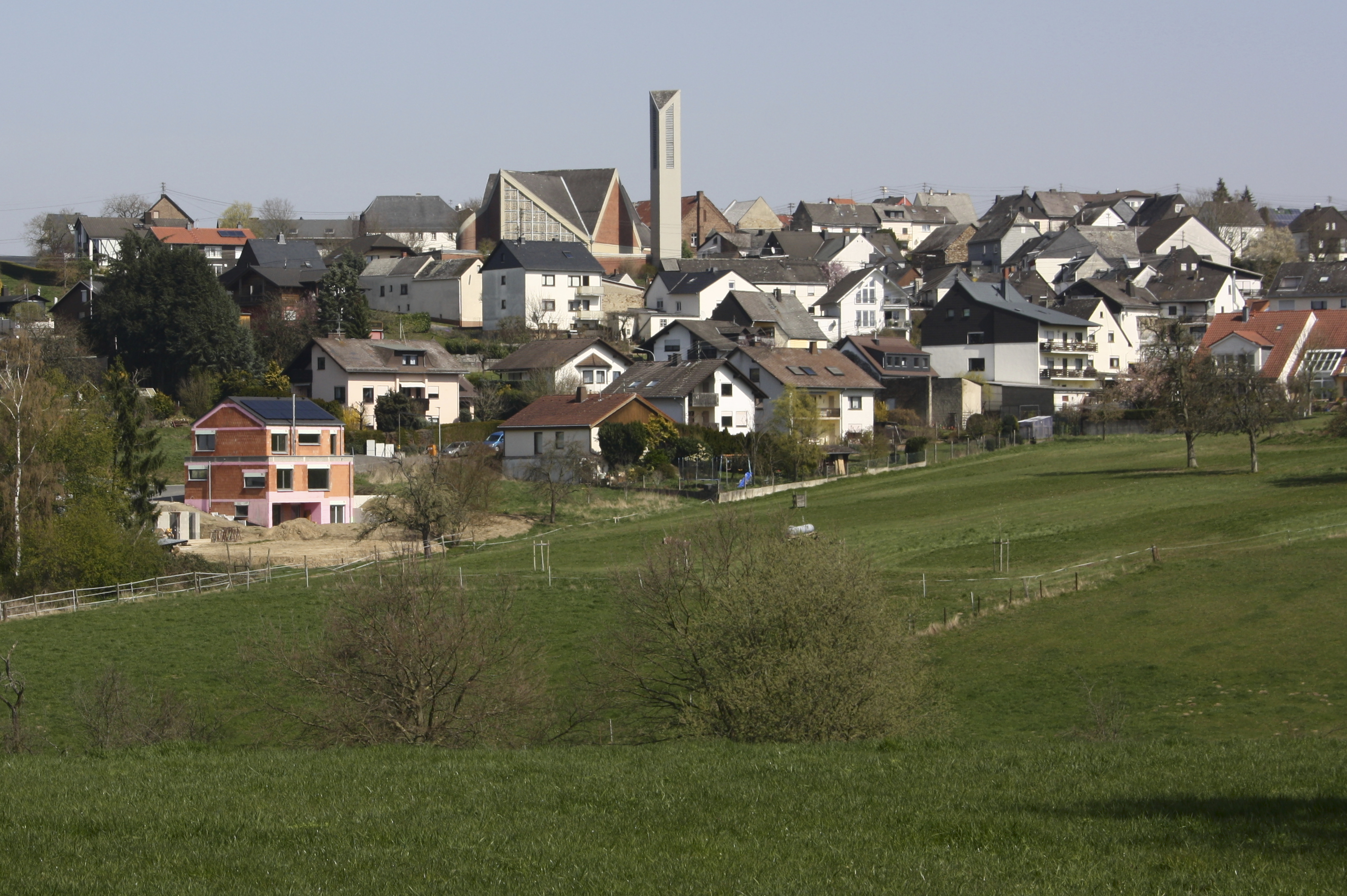 Simmern, Westerwaldkreis, Rheinland-Pfalz, Deutschland